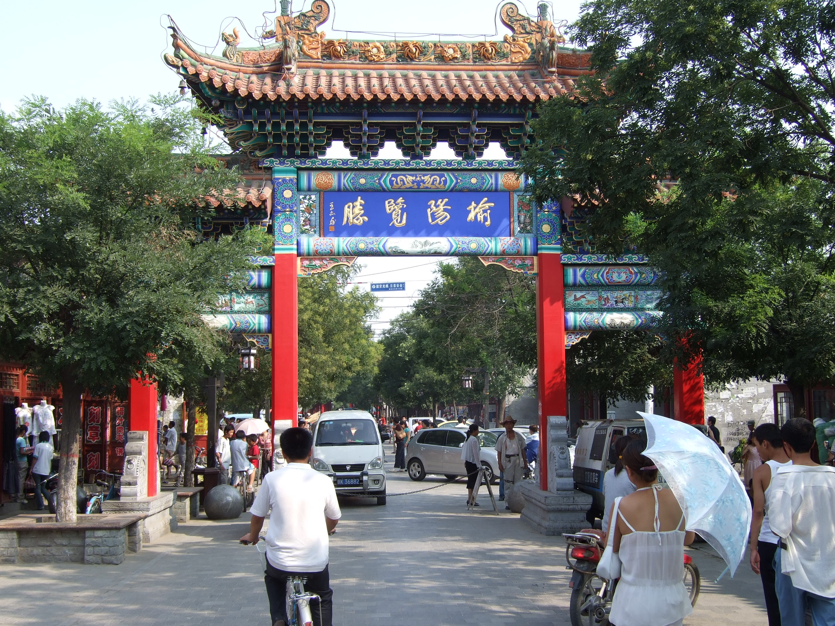 main street, Yulin